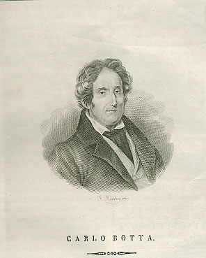 Carlo Botta (1766-1837), historian.